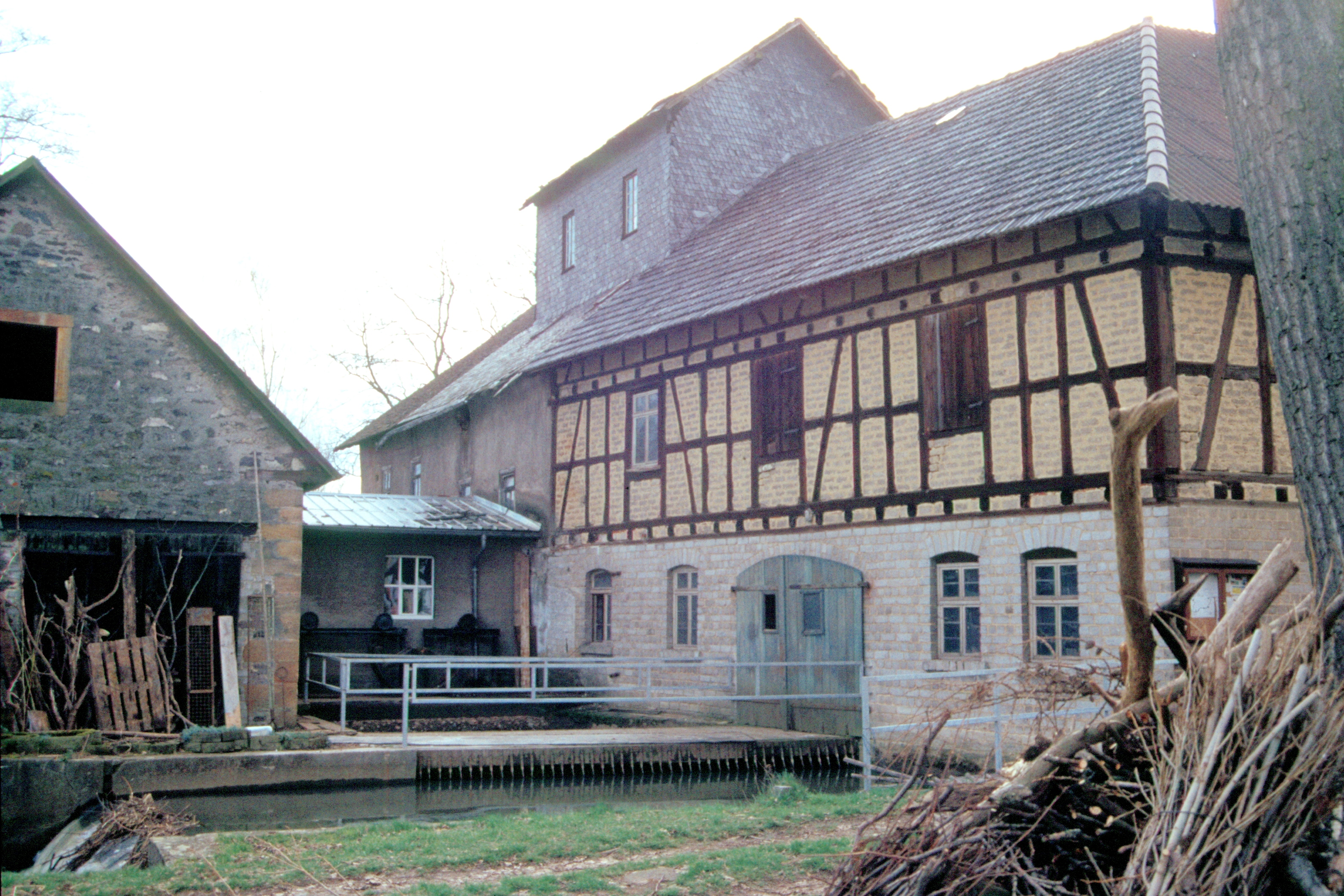 Utpher Mühle in Hungen - Utphe vom 24. 03. 1992 Rückseite mit Turbineneinlauf. Digitalisiertes Diapositiv